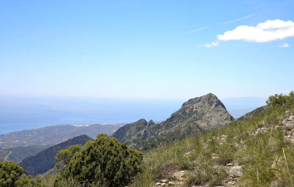 Sierra de Almijara